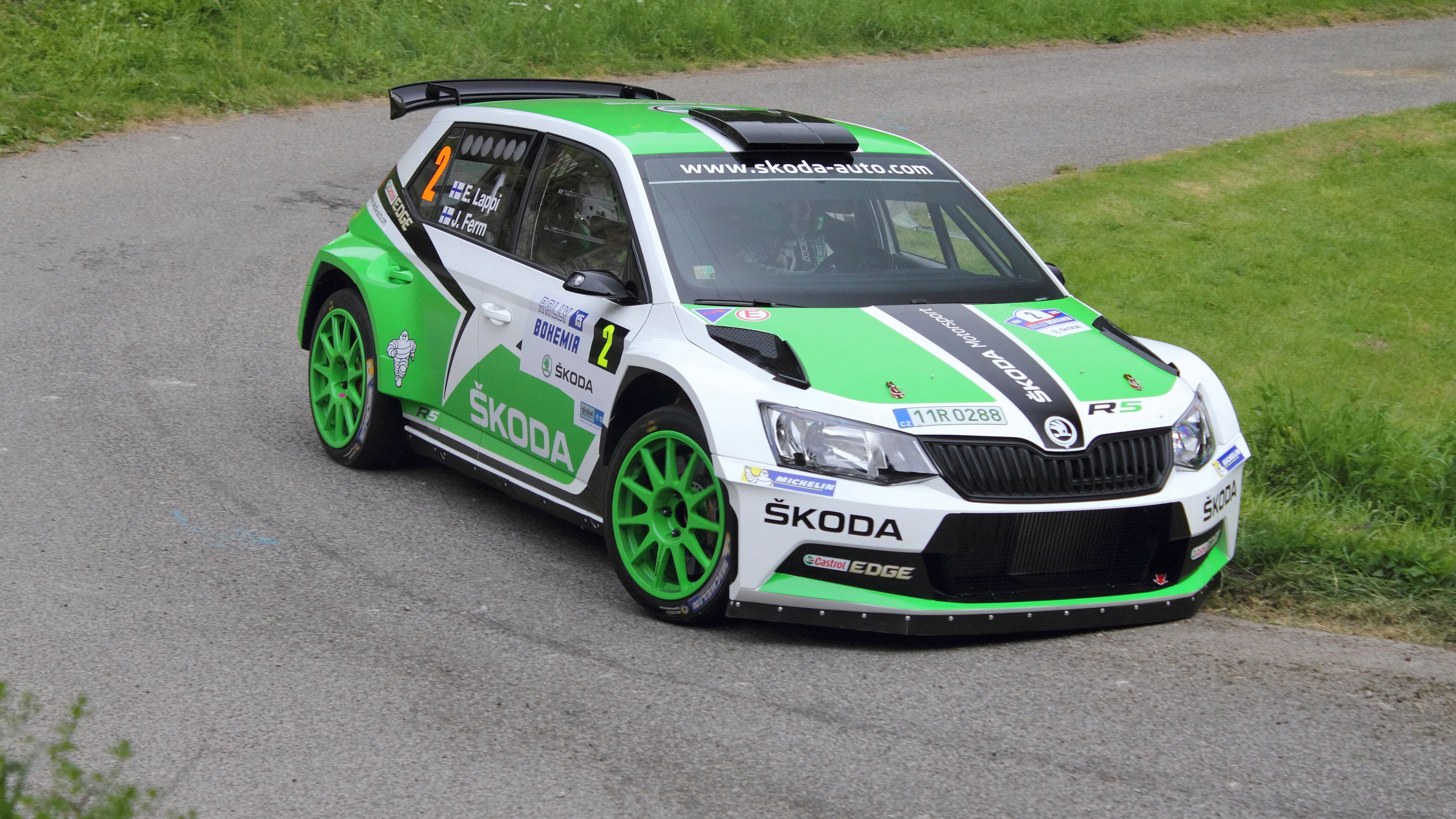 Rally Bohemia 2015